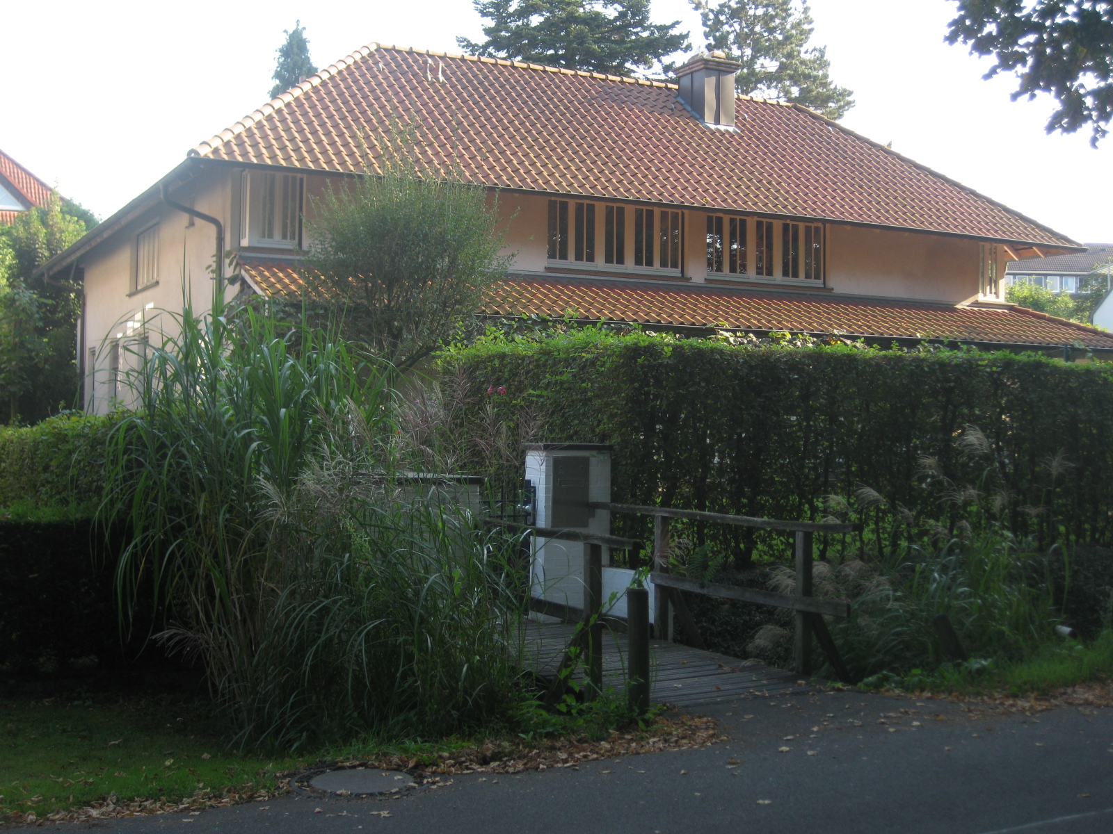 Doppelhaus um L-förmigen Grundriss mit Veranden, Eckfenstern in Anlehung eines Landhauses im Vorort Mauritz (Prozessionsweg)